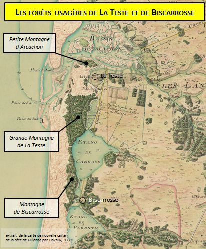 extrait de la « Nouvelle Carte de la côte de Guienne par Clavaux, ingénieur de la Légion-corse, 1772 », annotée